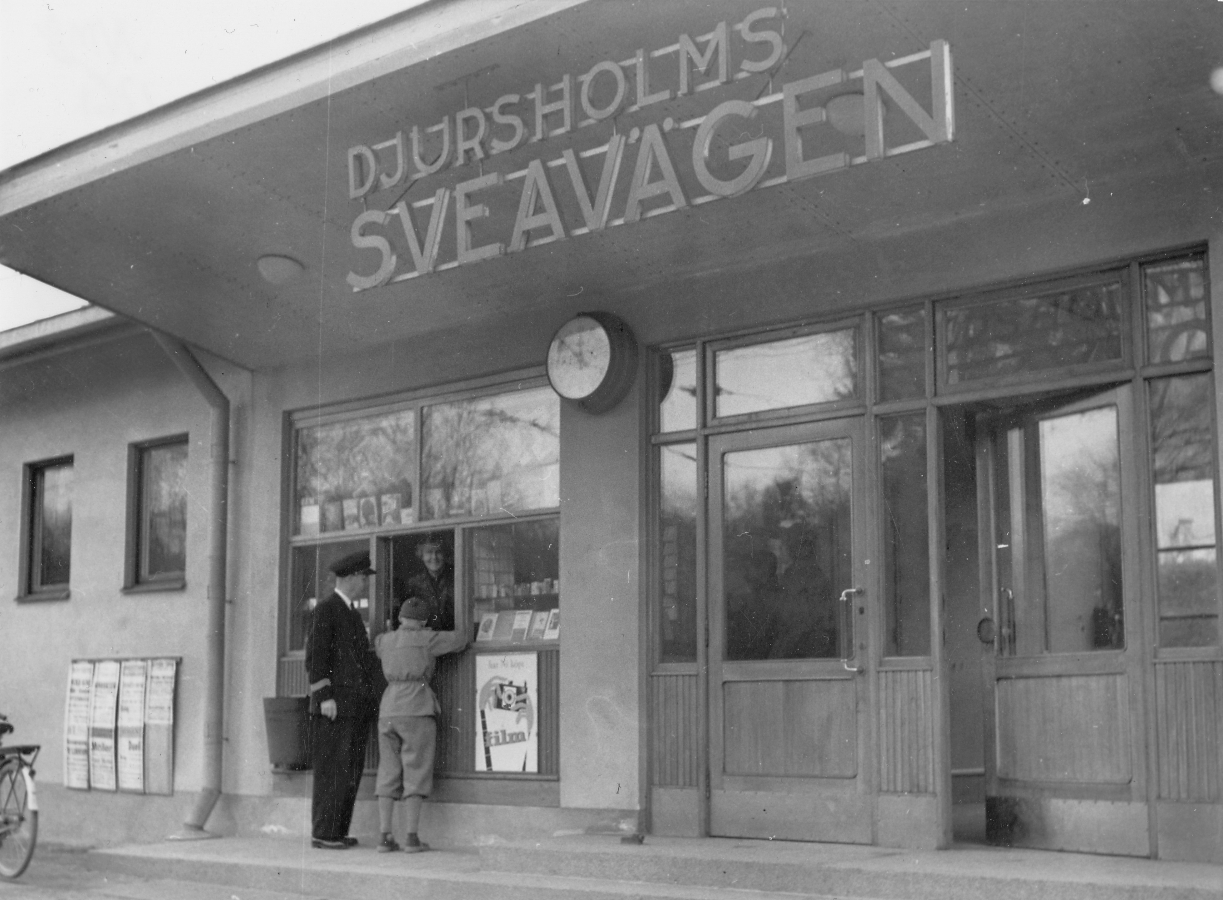 Djursholms Sveavägen på linjen Djursholms Ösby-Eddavägen, Stockholm-Roslagens Järnvägar. Ur SJ-nytt nr. 2/1951.